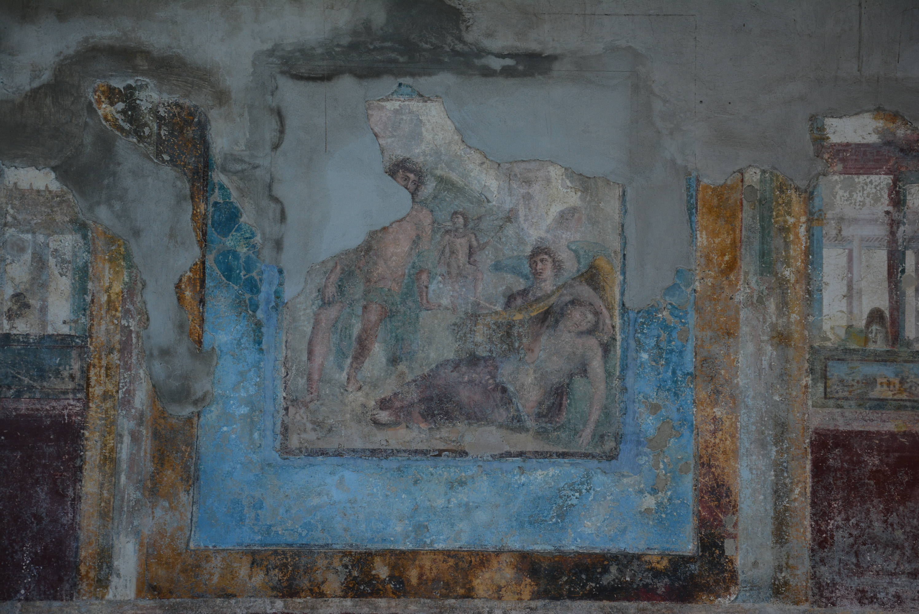 Villa Arianna, Stabia - MIBAC This is a photo of a monument which is part of cultural heritage of Italy.